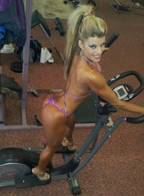 Yasmina preparándose para salir en el Campeonato del Mundo celebrado el pasado Noviembre en Martin (Eslovaquia)